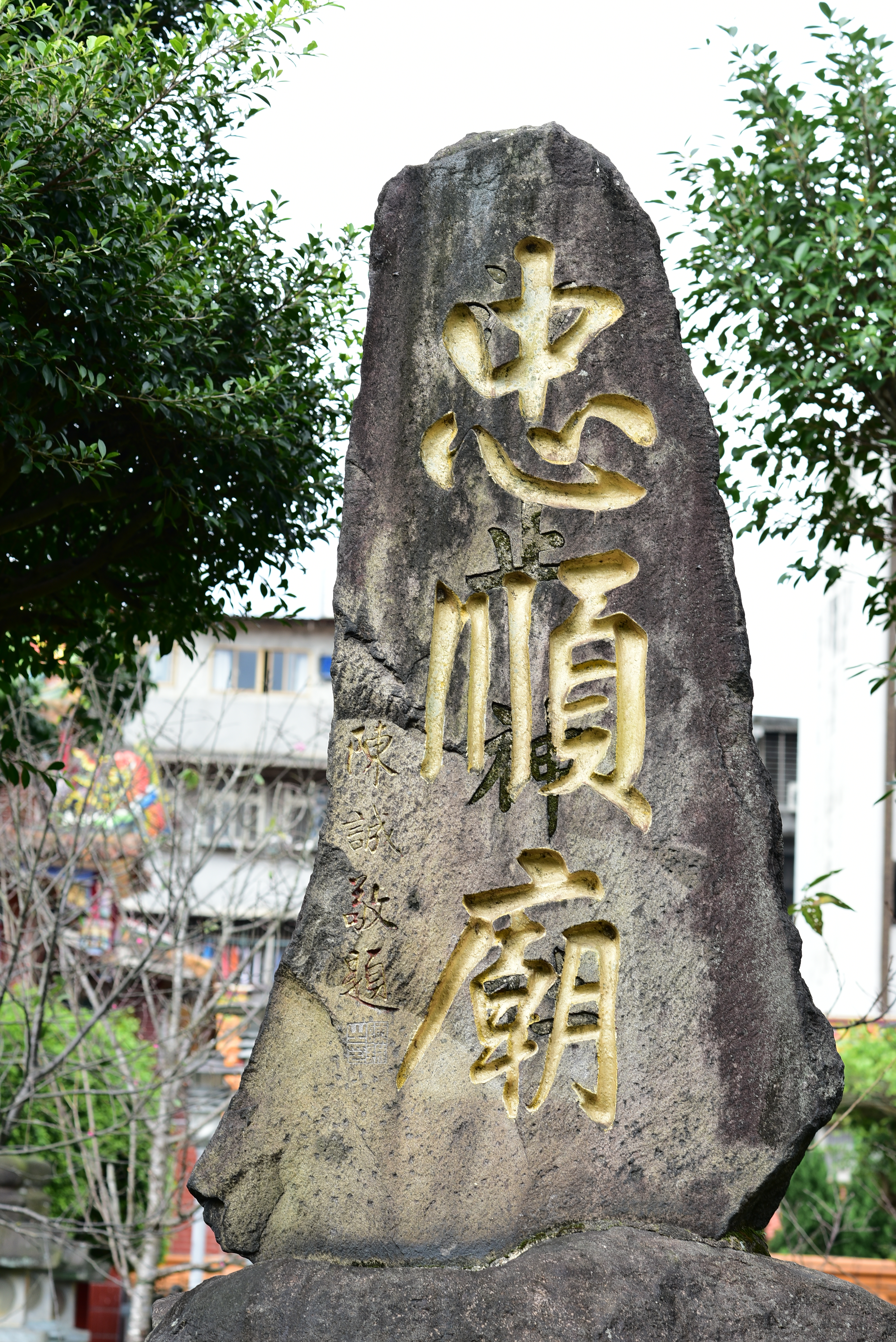 汐止神社碑與忠順廟重疊